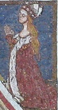 Mozaika Poslední soud z let 1370-1371 na jižní straně nad Zlatou branou katedrály sv. Víta na Pražském hradě - detail postavy Alžběty Pomořanské